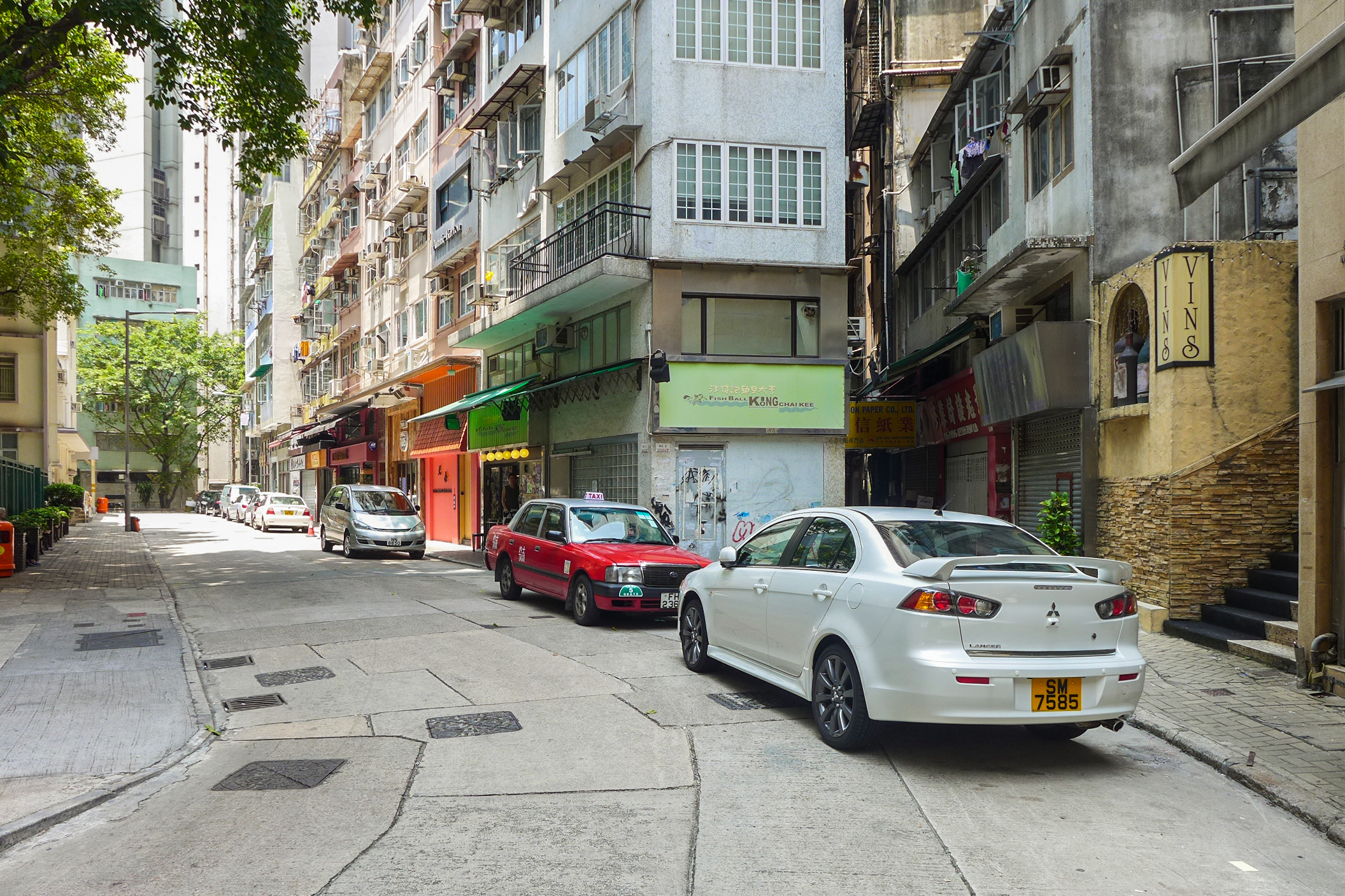 Kau U Fong